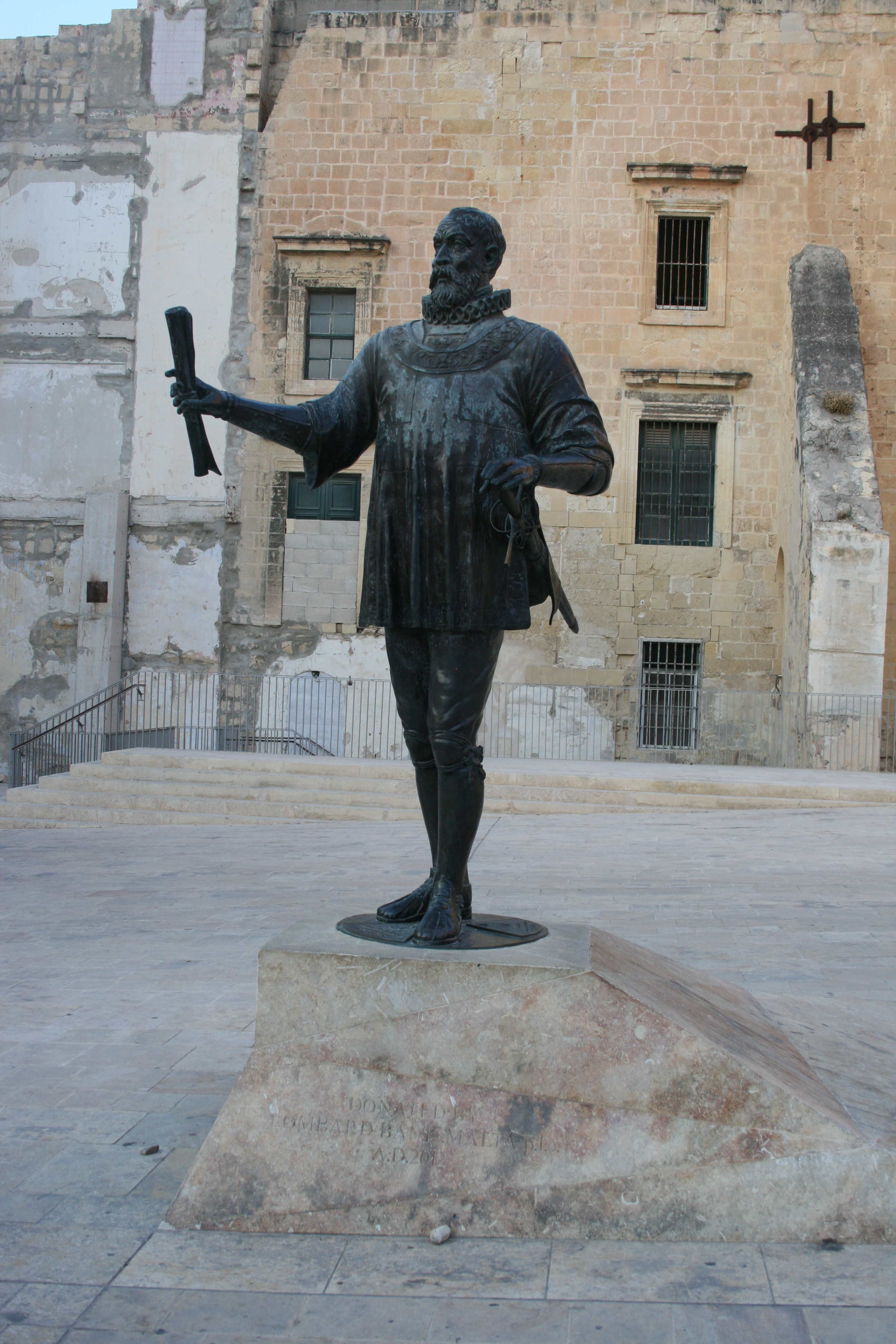 Denkmal für Jean de la Valette in Valetta